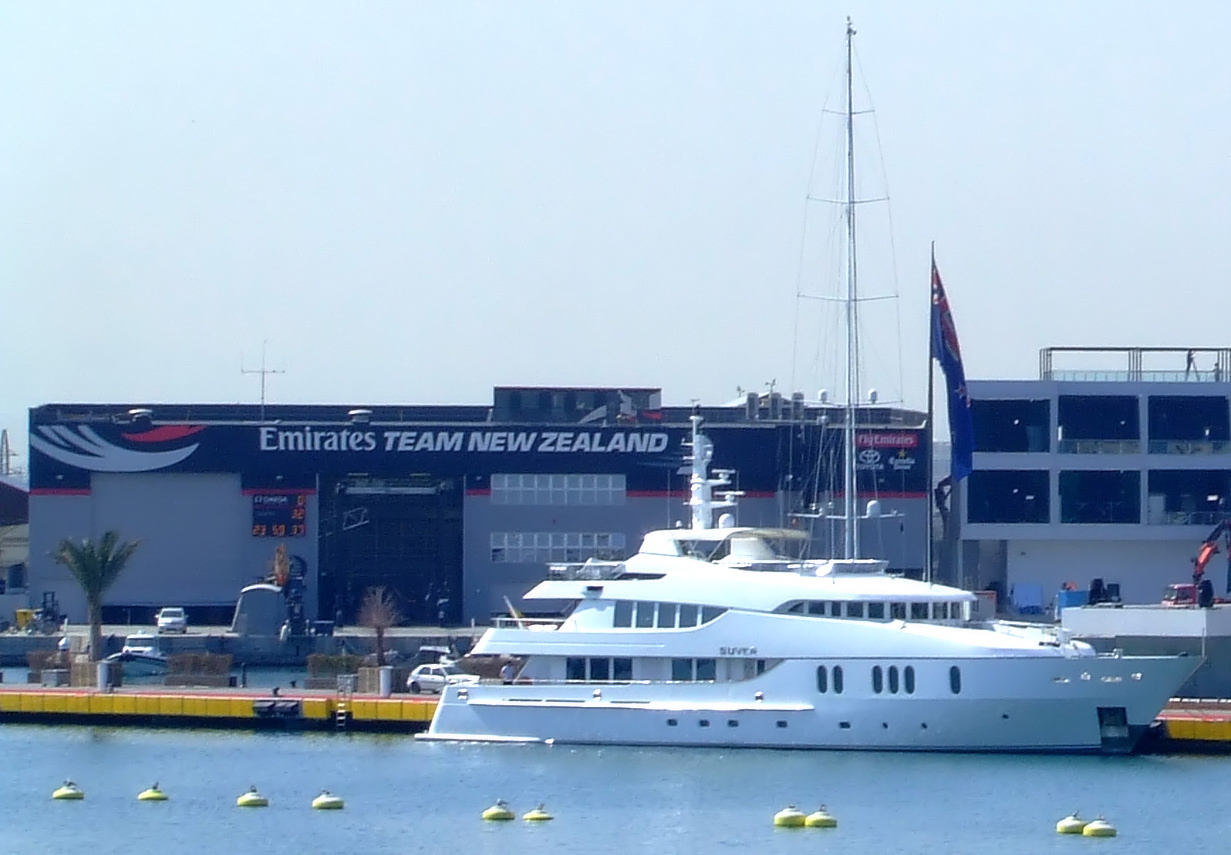 Suver, base di Emirates Team New Zealand a Valencia.